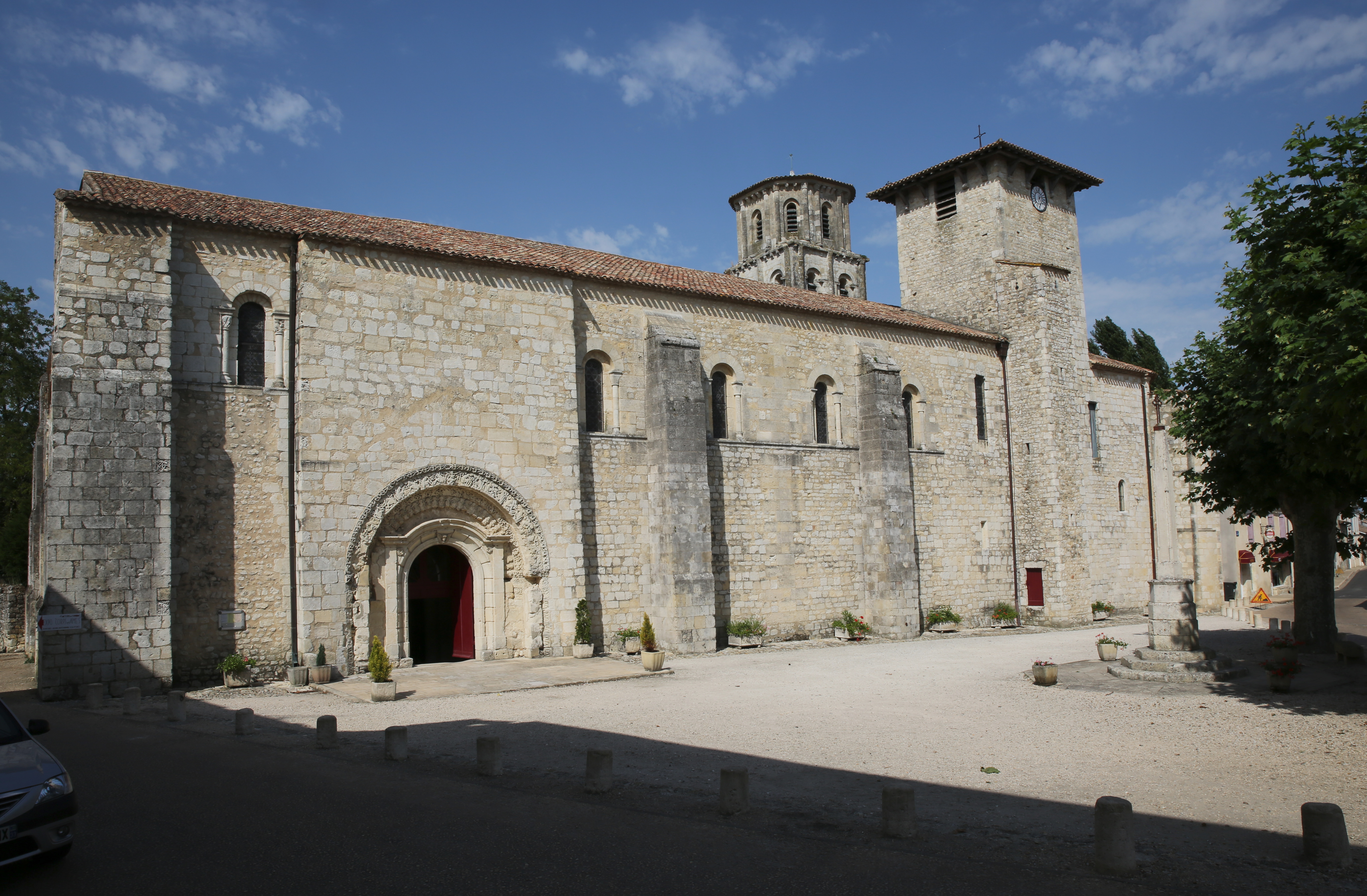 Abbaye de Vertheuil